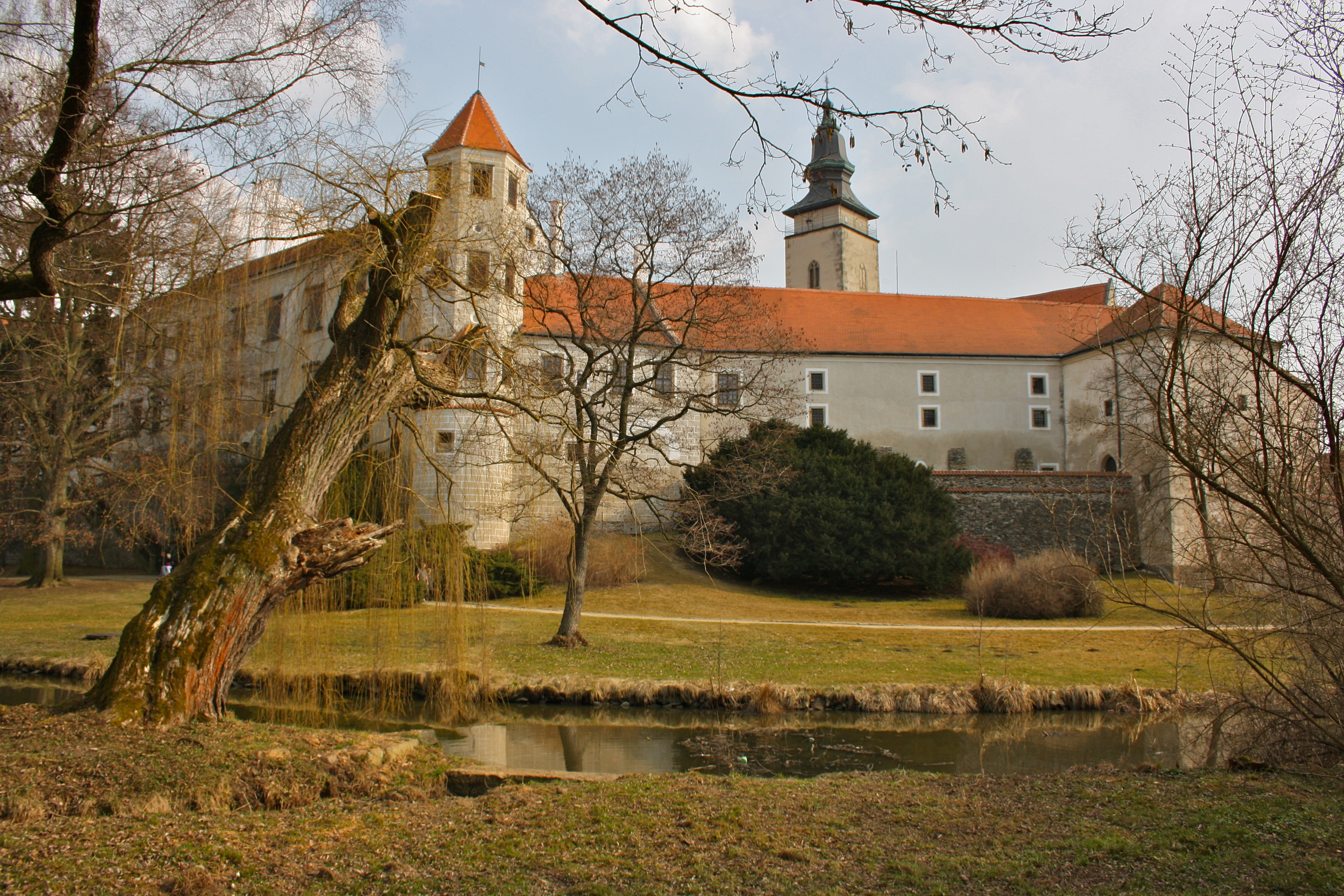 Zámek Telč, nám. Zachariáše z Hradce 1, Telč